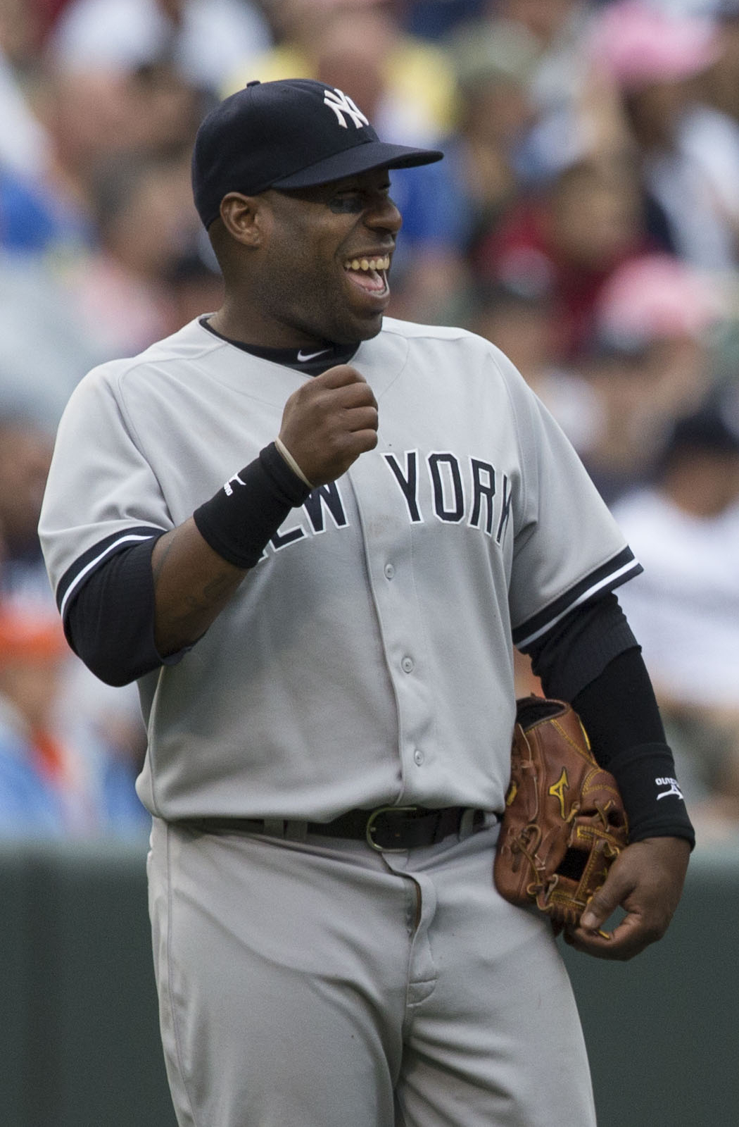 Zelous Wheeler